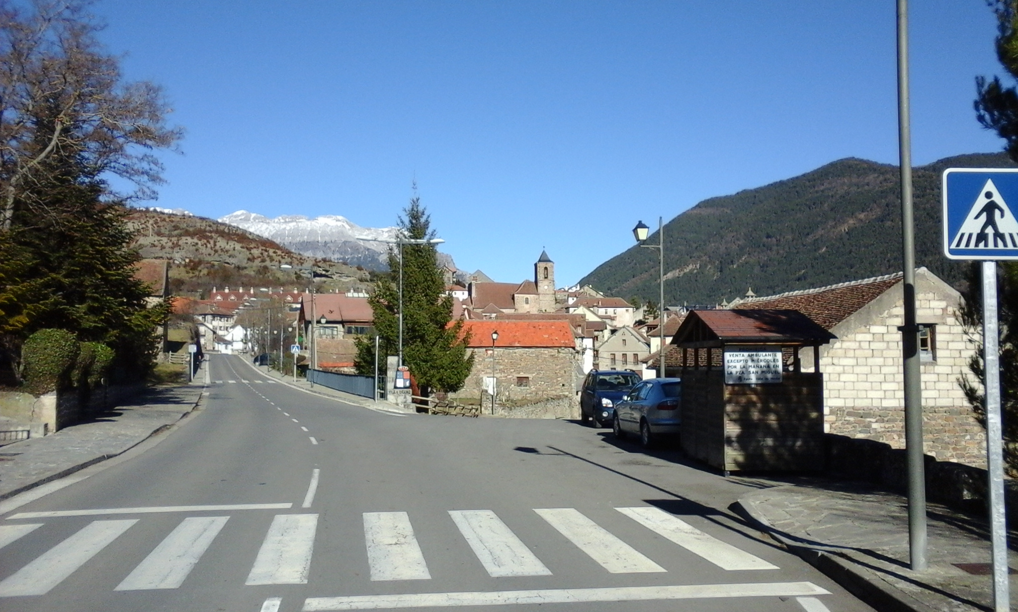 Hecho, Huesca, España